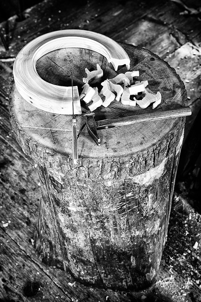 Reifendreher